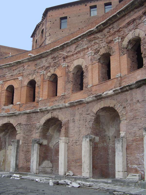 Trajansmärkte am Trajansforum in Rom; Ansicht der Bögen